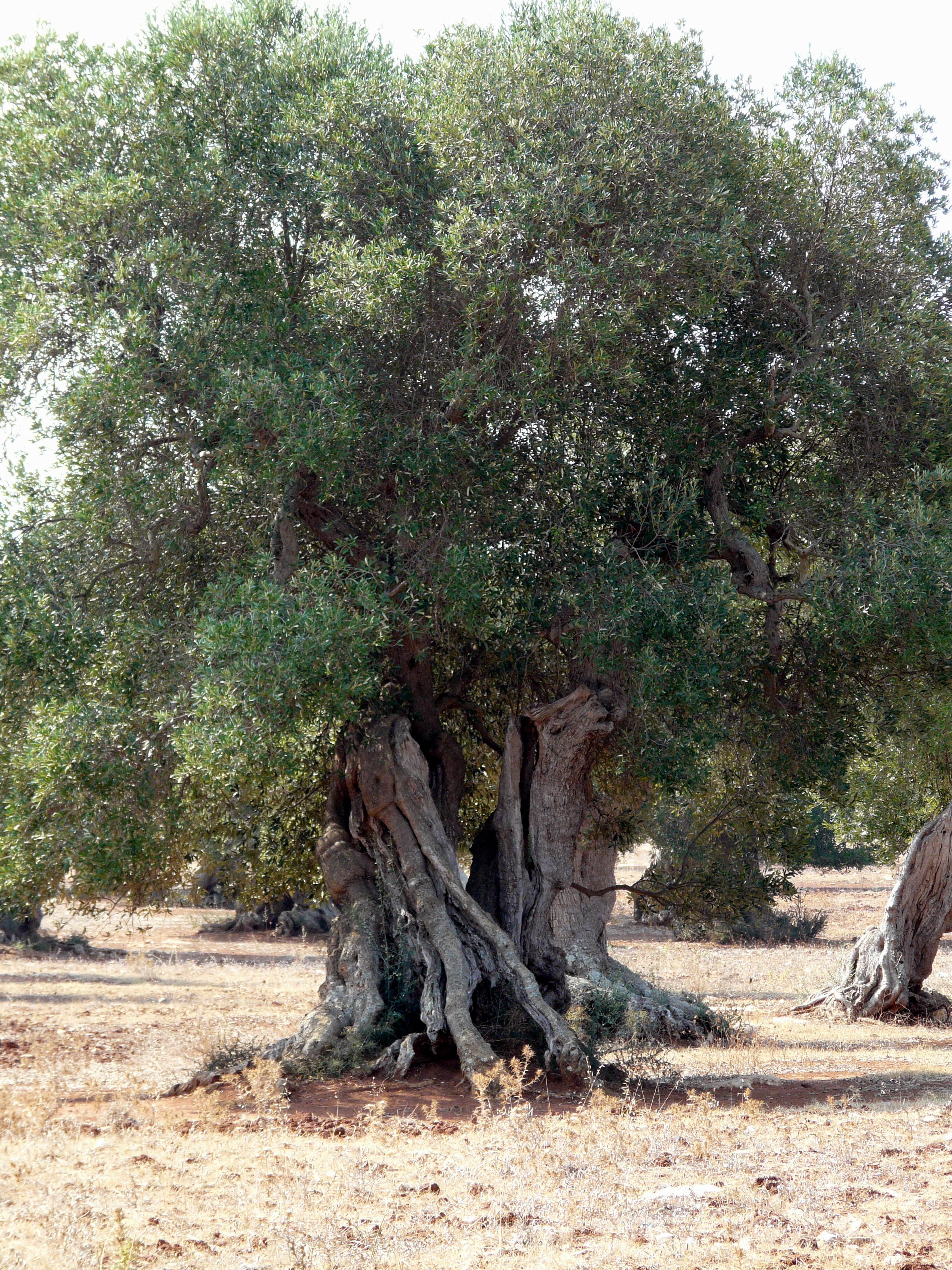 Salento, ulivo secolare